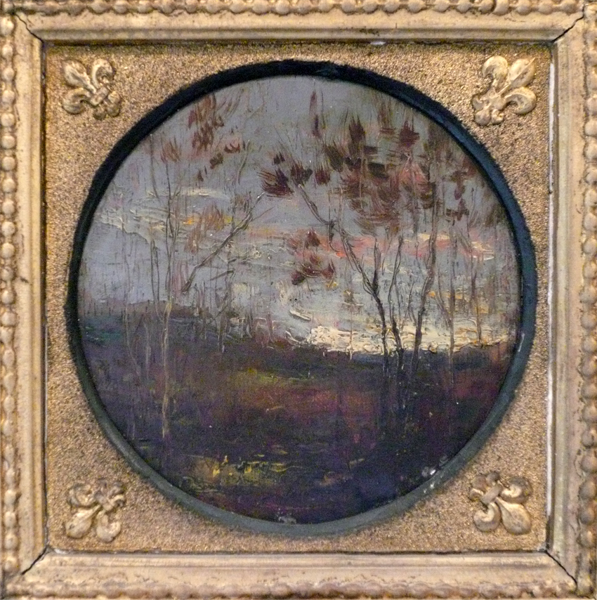 Le nuage rose, Francois-Auguste Ravier, Musée Albert André, Bagnols-sur-Cèze, Gard